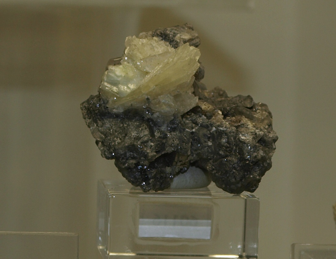 Leadhillit - Fundort: Cumberland, England - aufgenommen im Mineralogischen Museum der Universität Bonn